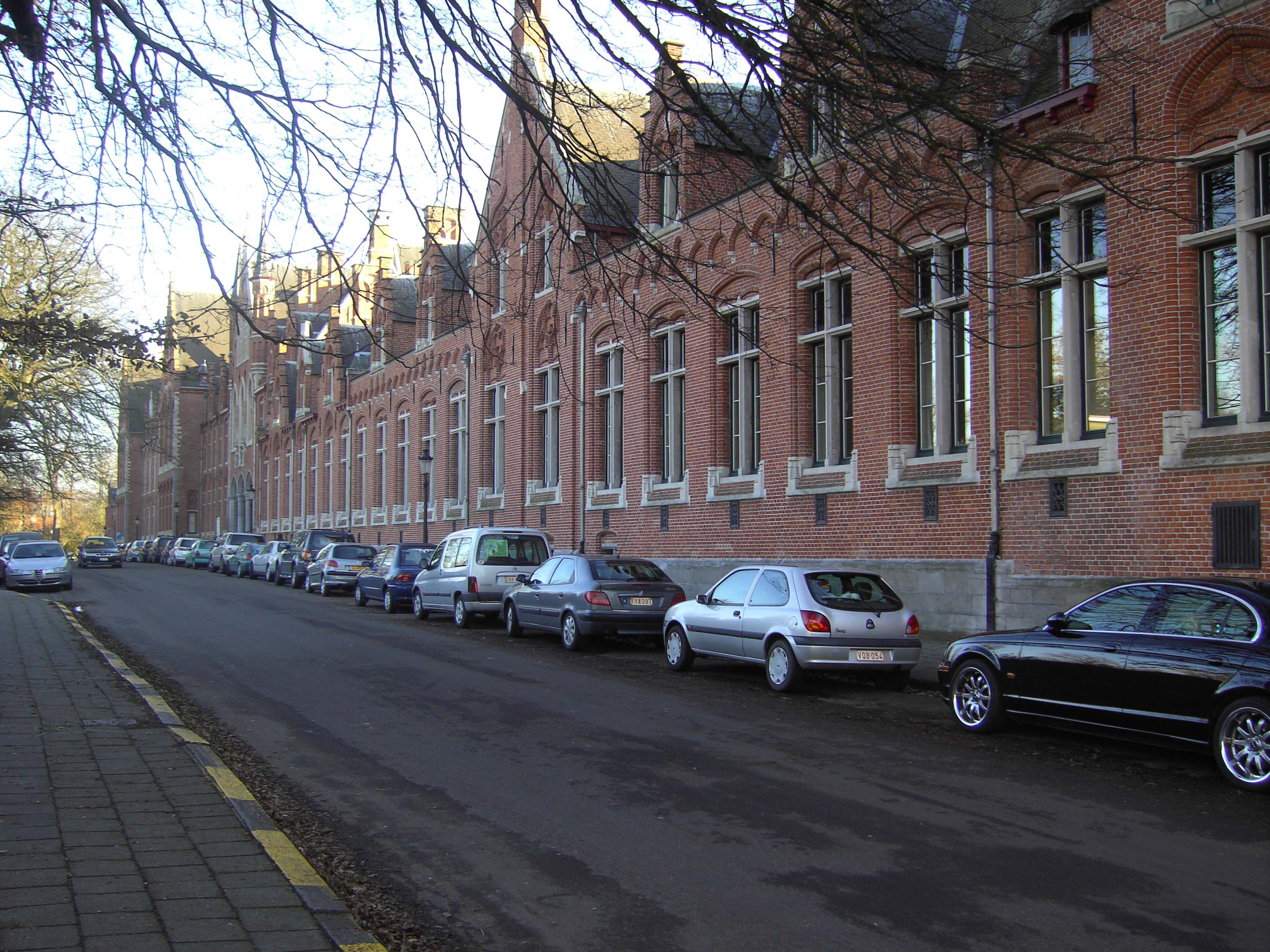 De Minnewaterkliniek - Professor Doctor Joseph Sebrechtsstraat - Brugge - West-Vlaanderen - België